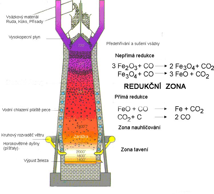 Znázorňuje schematicky profil vysoké pece a v peci probíhající reakce.